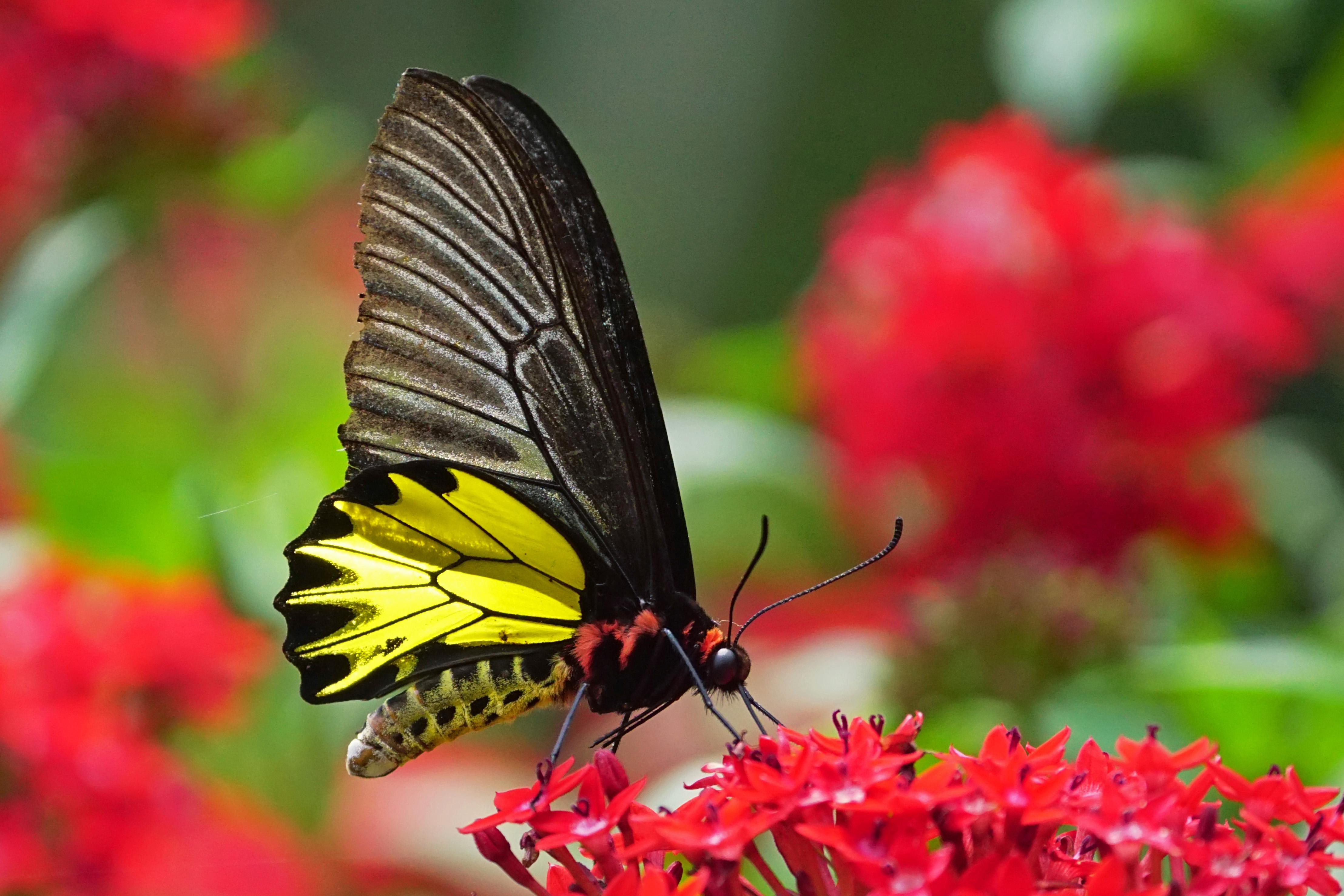 黃裳鳳蝶 Troides aeacus formosanus